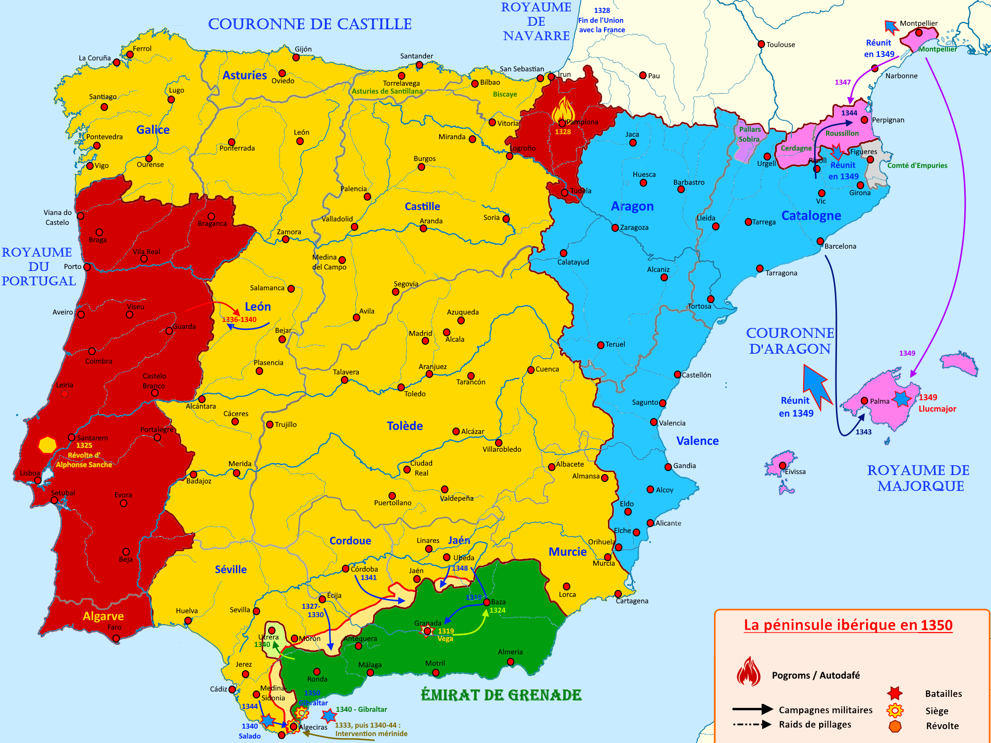 Carte de la péninsule ibérique en 1350 montrant les grands évènements de la période